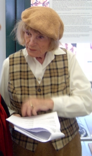 Die Diseuse und Schauspielerin Gisela May während einer Ausstellungseröffnung in Berlin-Mitte, Juni 2008.